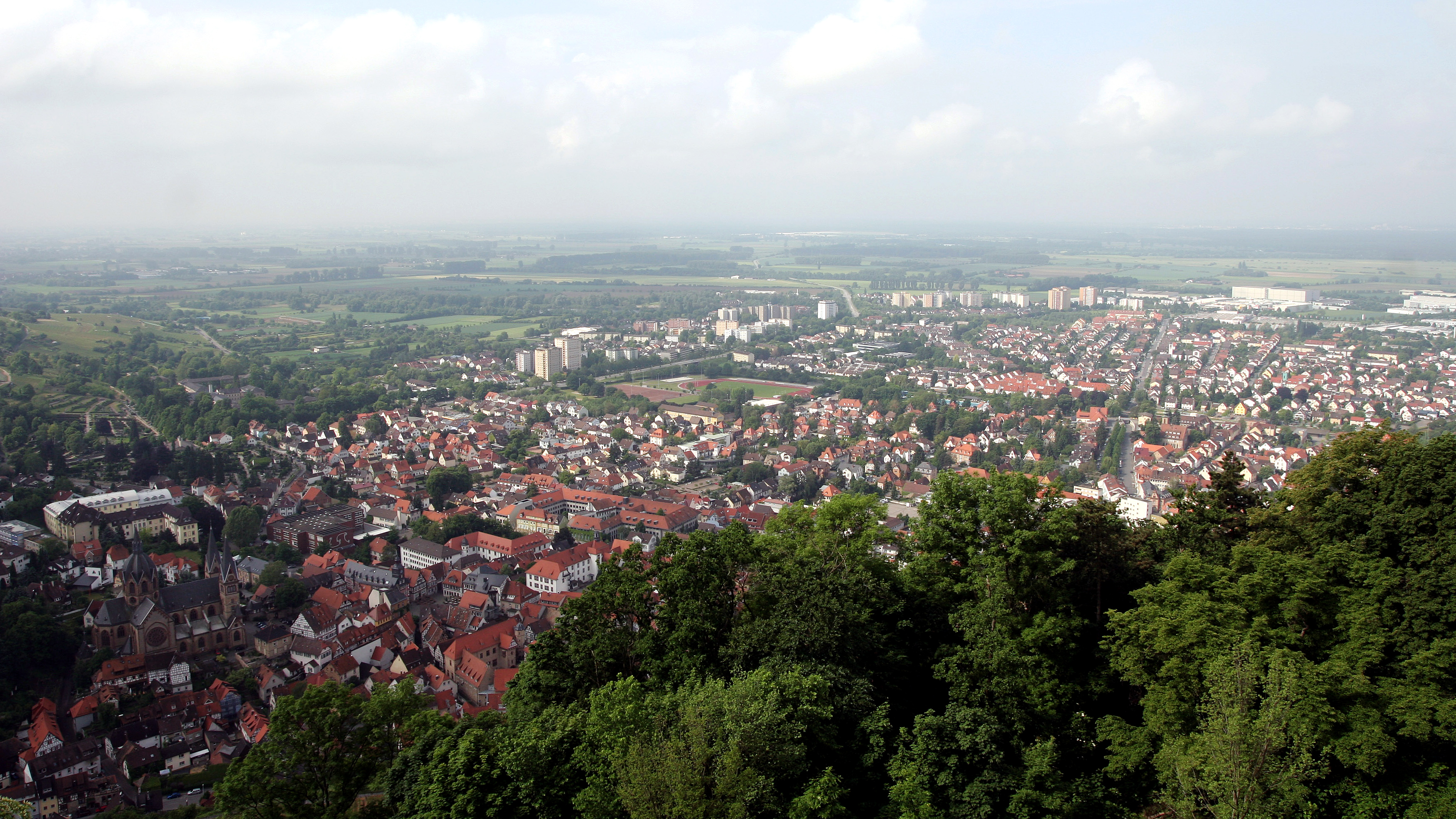 Blick auf die Stadt Heppenheim (Bergstraße) von der Starkenburg aus.